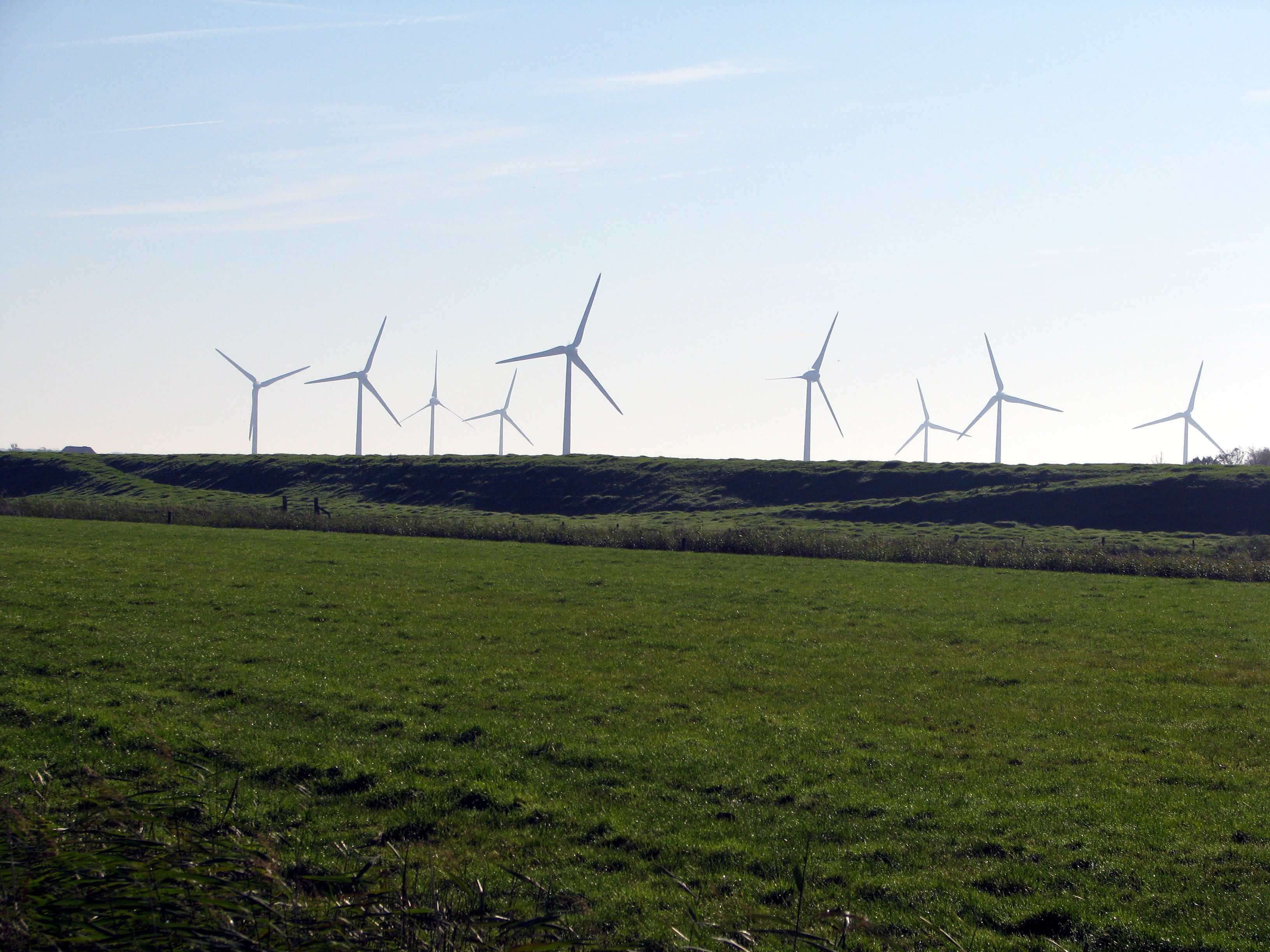 Akt am Deich des Ockholmer Kooges zum Übergang in den Louisenkoog